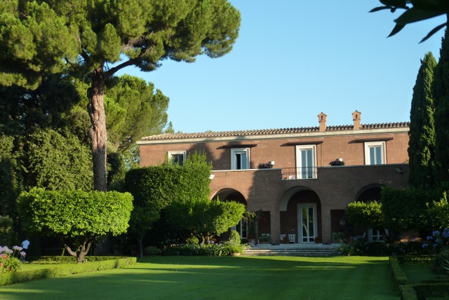 Villa Almone con il giardino